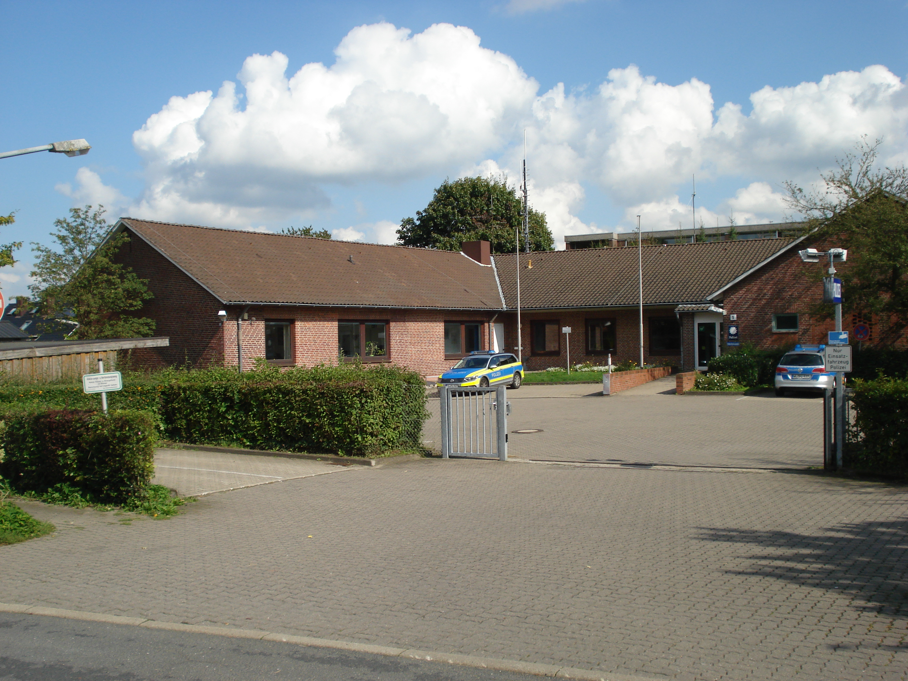 Polizeikommissariat Seevetal in Hittfeld (Polizeiinspektion Harburg)